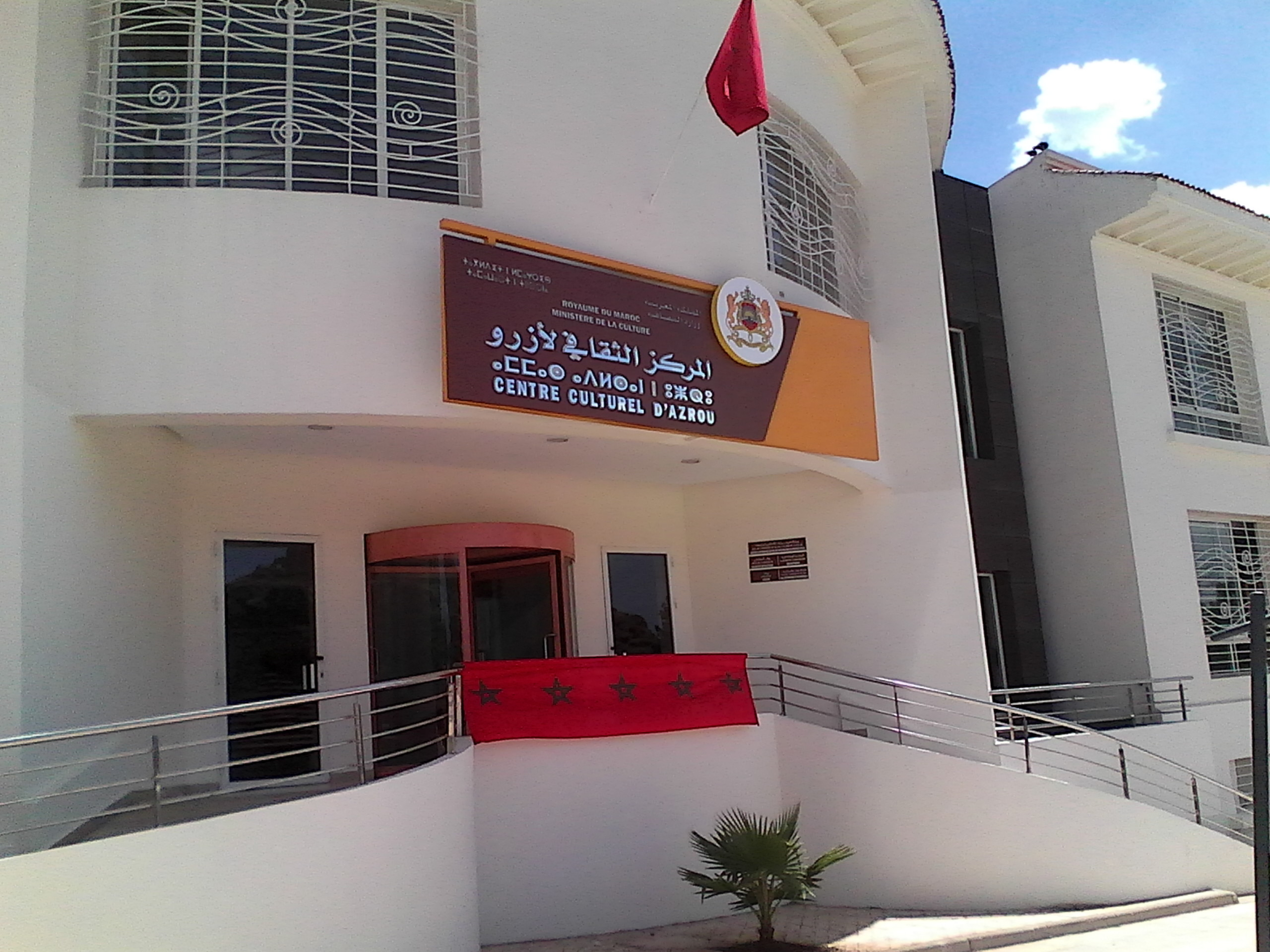 Centre culturel d'Azrou abritant le CIP du Moyen Atlas